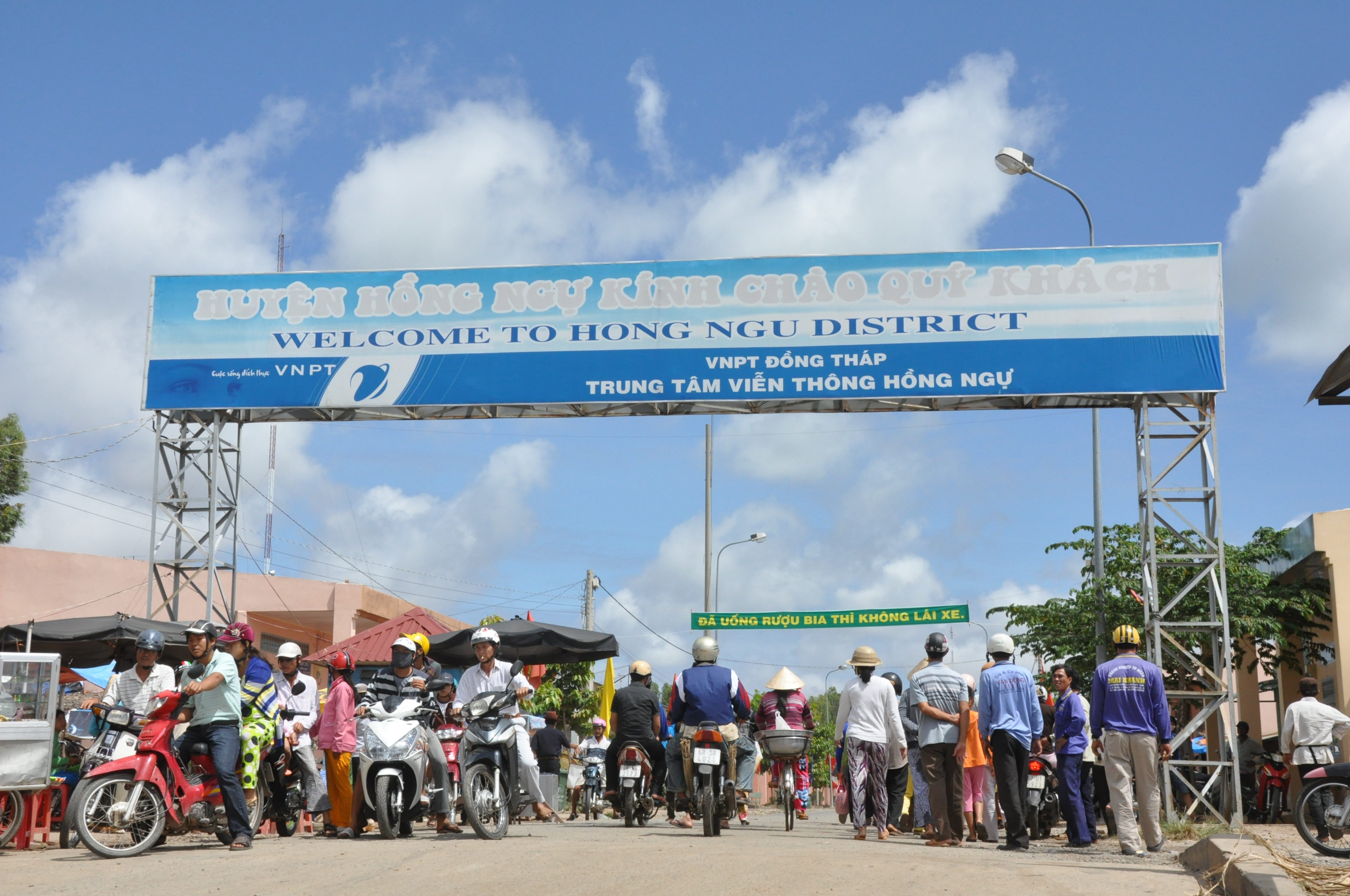 HUyen hong ngu - Dong Thap